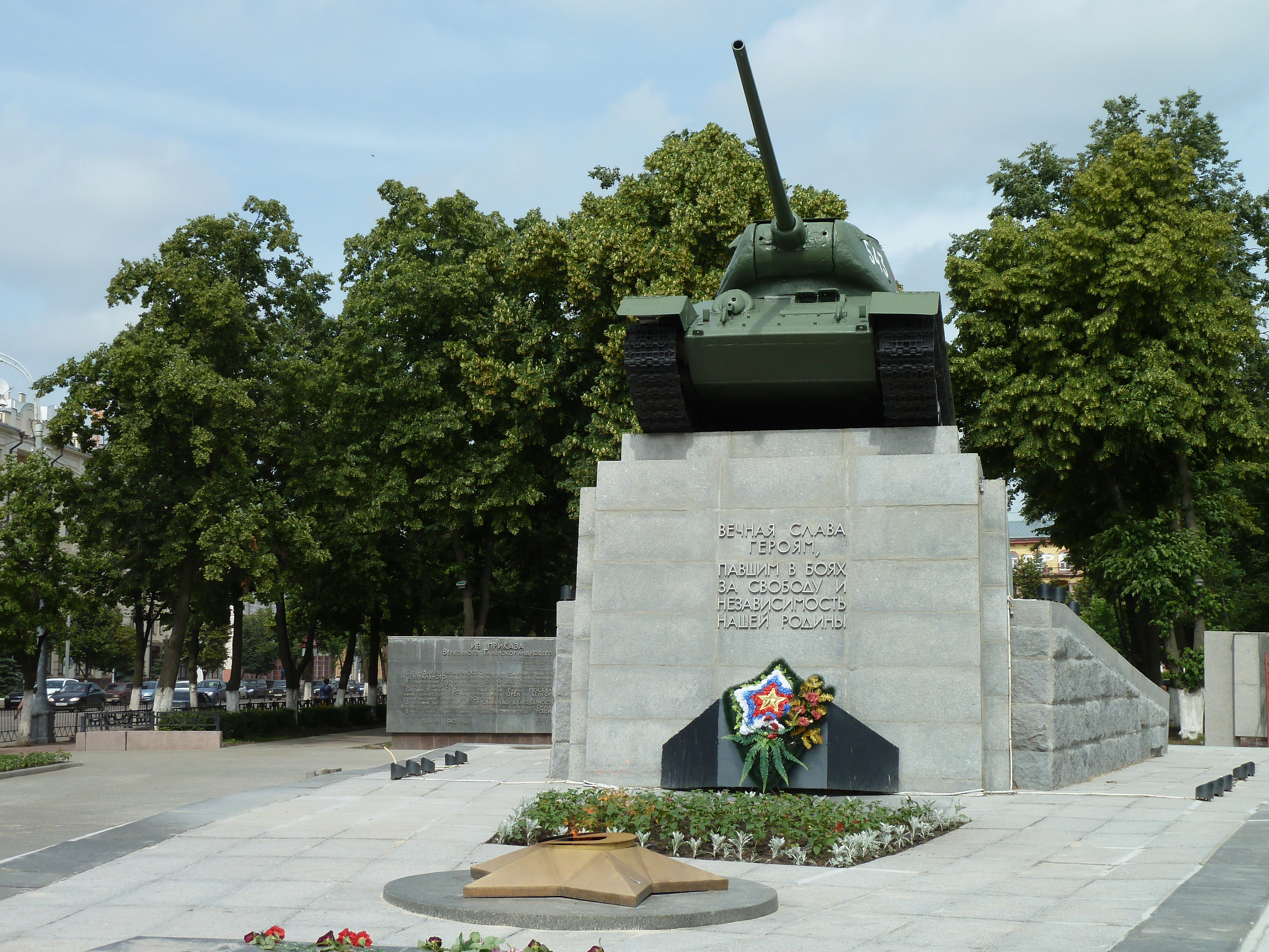 "Т-34"